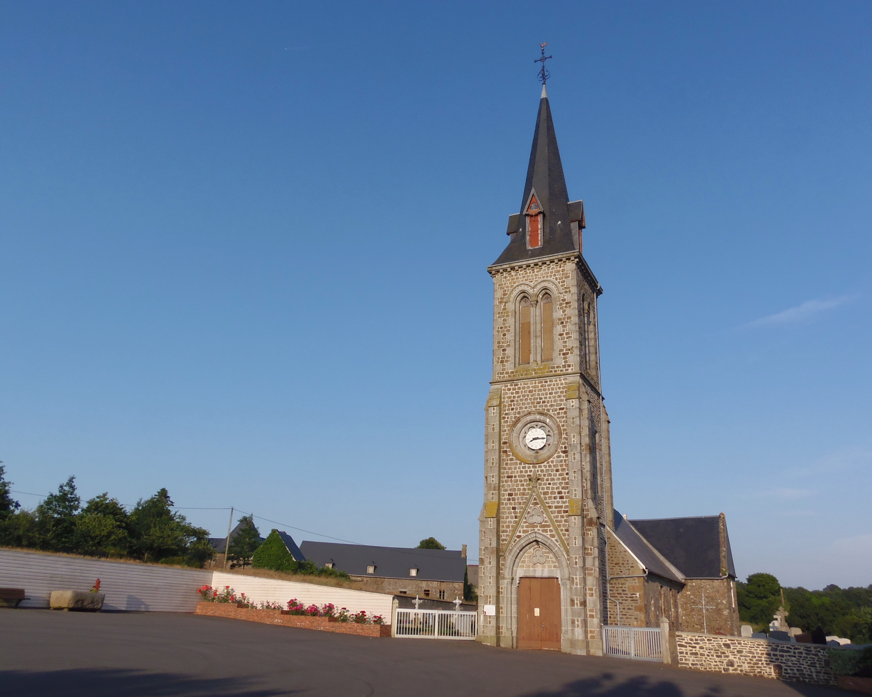 Saint-Christophe-de-Chaulieu (Normandie, France). L'église Saint-Christophe.